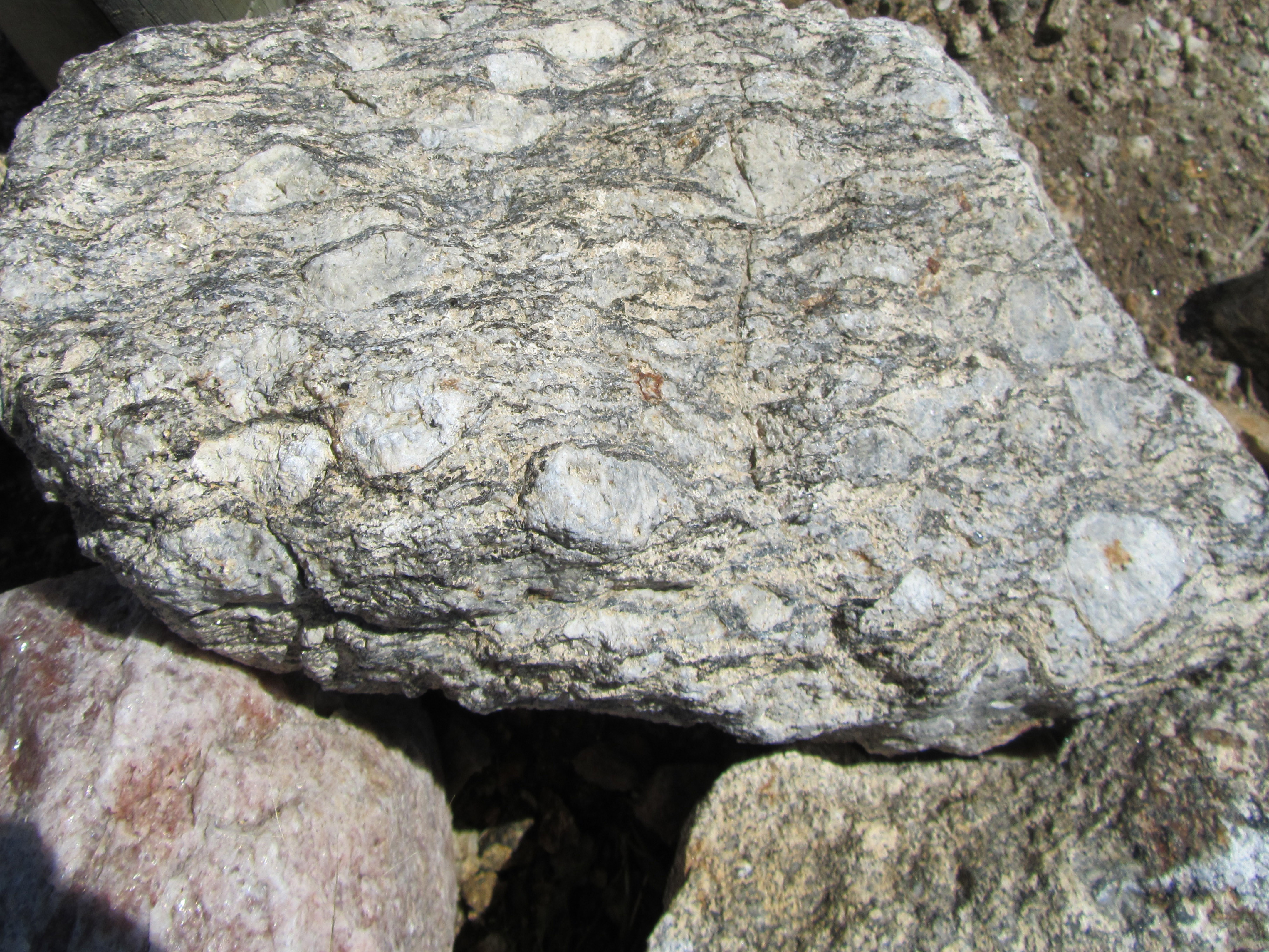 Muestra de gneis